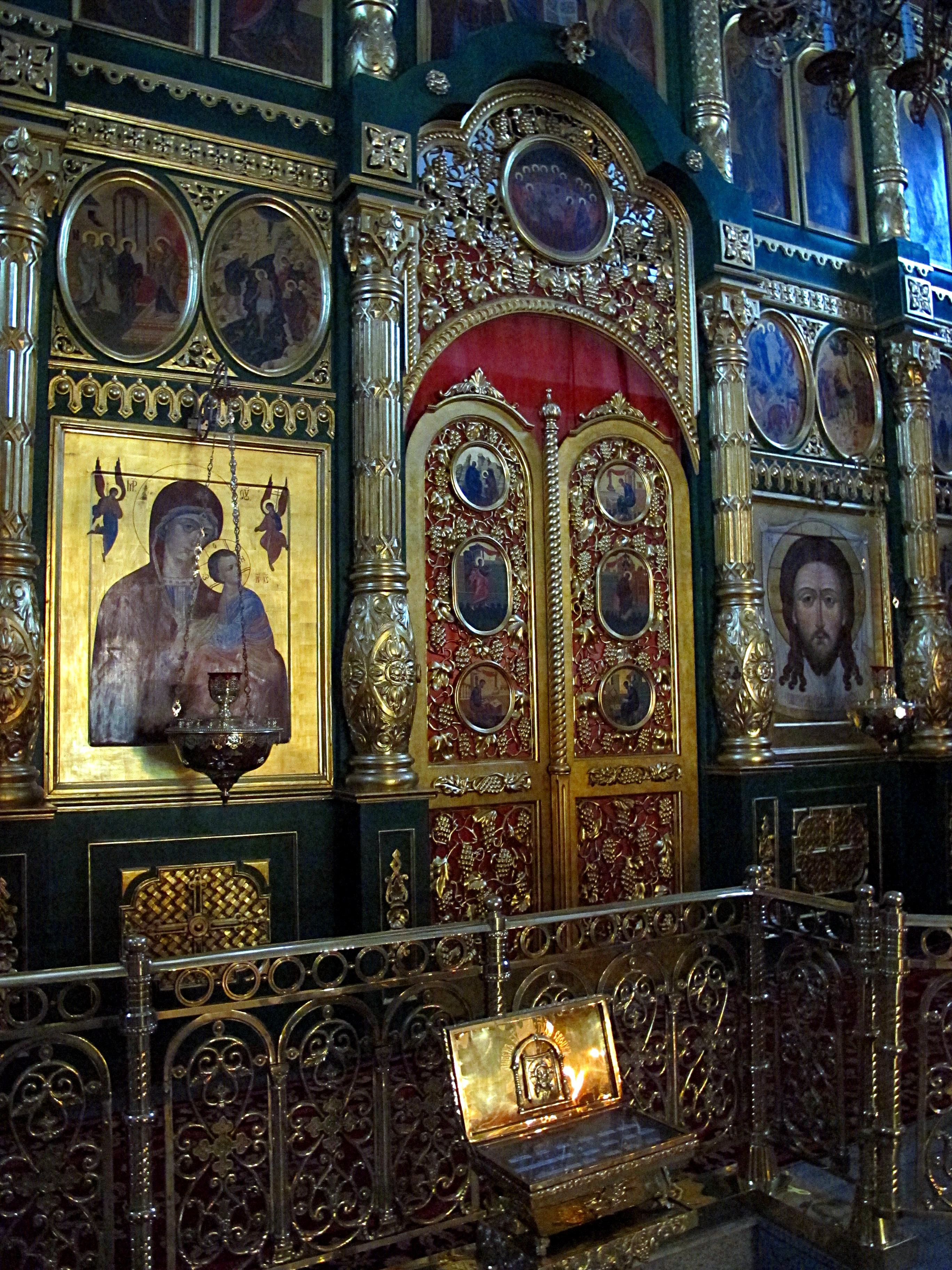 2011-05-12 Вид на центральную часть главного иконостаса, царские врата и ковчег с мощами Храма Живоначальной Троицы в Листах